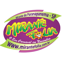 Logo.